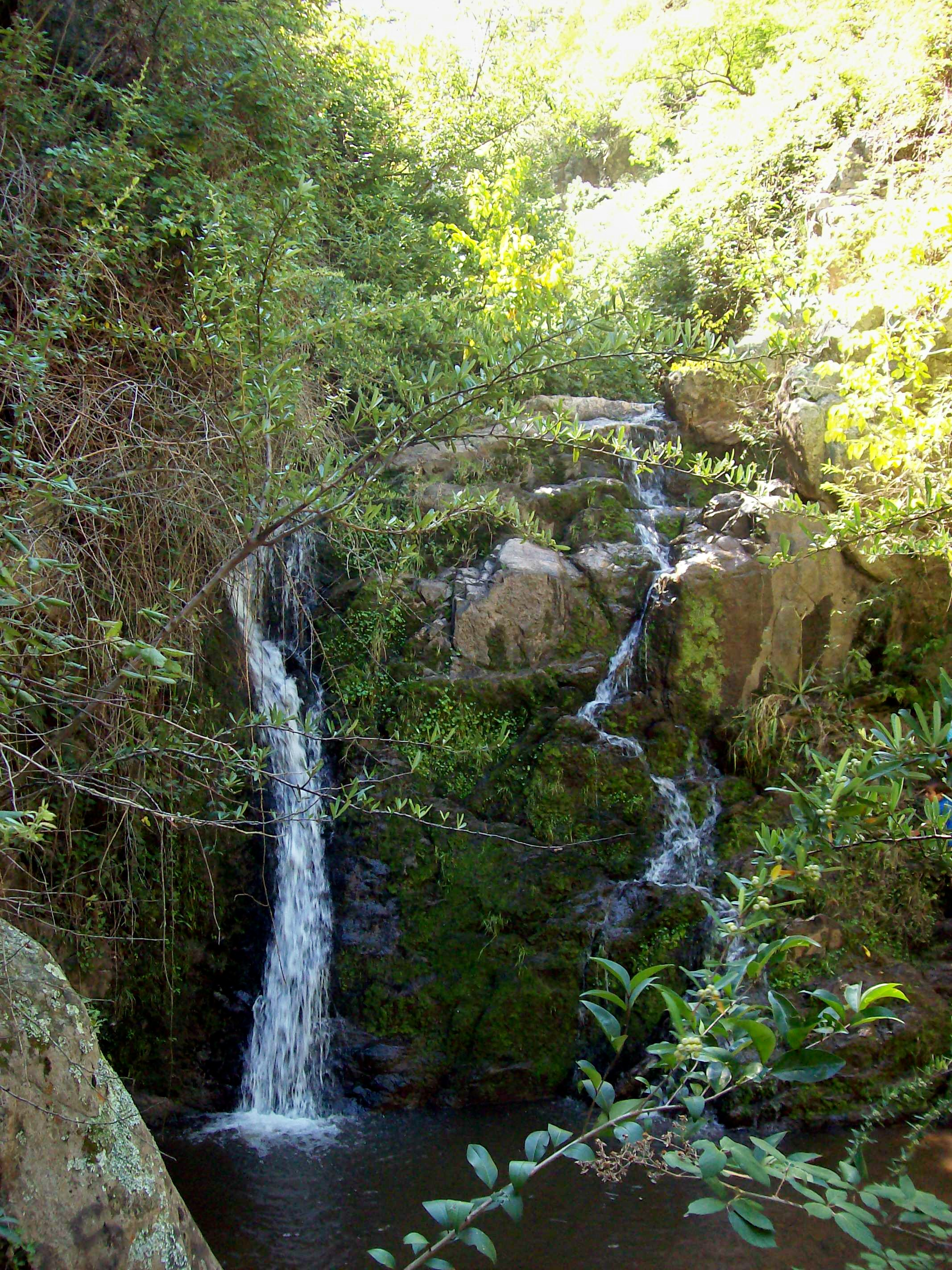 Cascada de los helechos, en el río Vaquerías en las afueras de Valle Hermoso, pcia. de Córdoba, Argentina. Las coordenadas dadas son aproximadas, con (estimo) no más de 300 m de error de la posición correcta